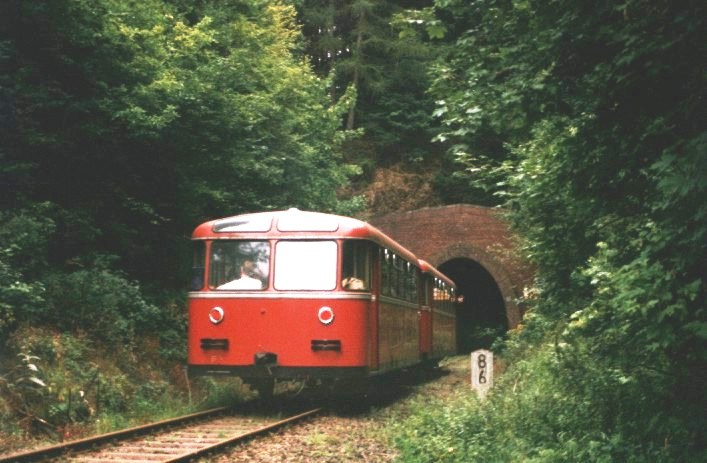 VT 95 am Westportal des Rabenscheider Tunnels